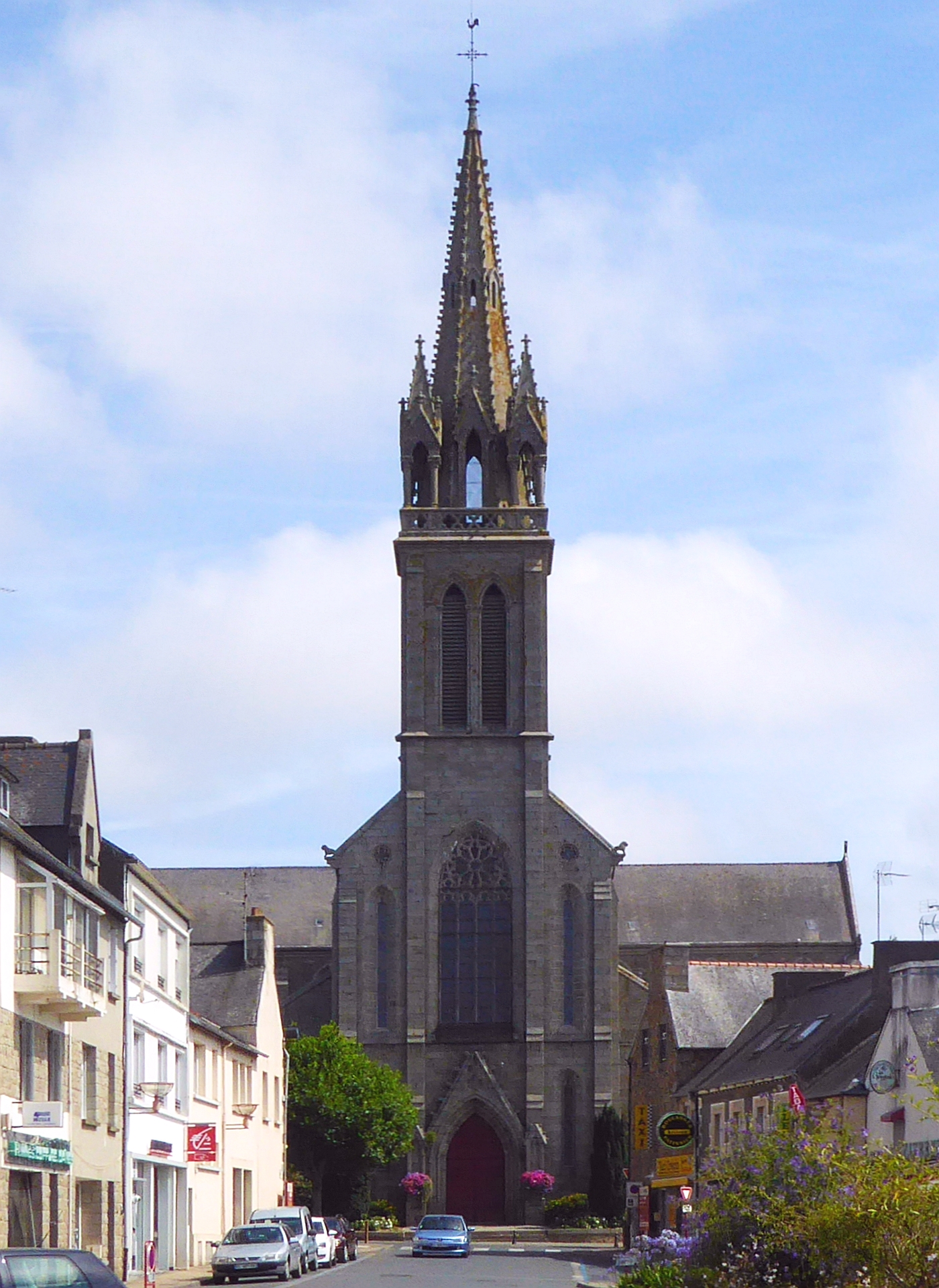 L'eglise Saint Pierre geweiht 08.09.1872 in Plouha Bretagne Frankreich - Foto Wolfgang Pehlemann P1030729